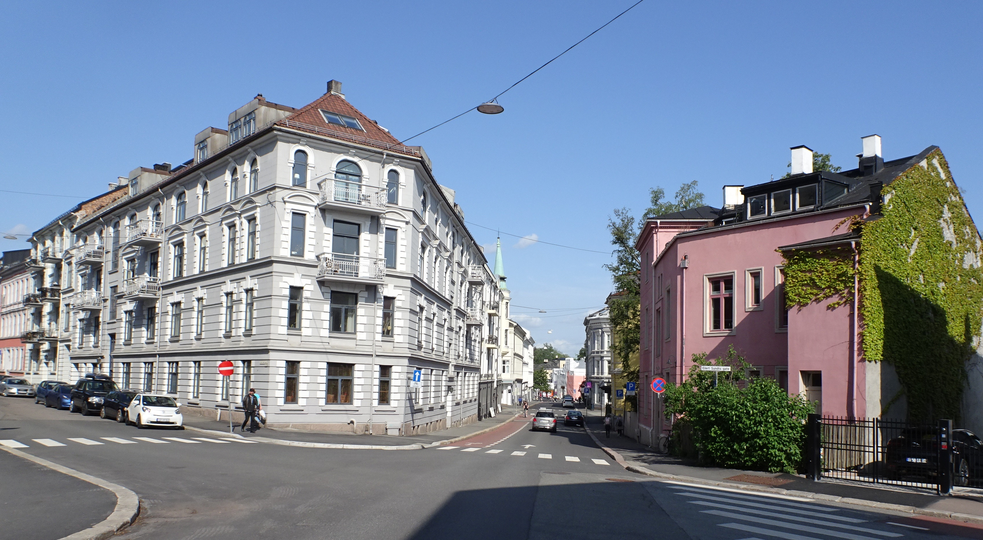 Professor Dahls gate nedover fra Eilert Sundts gate